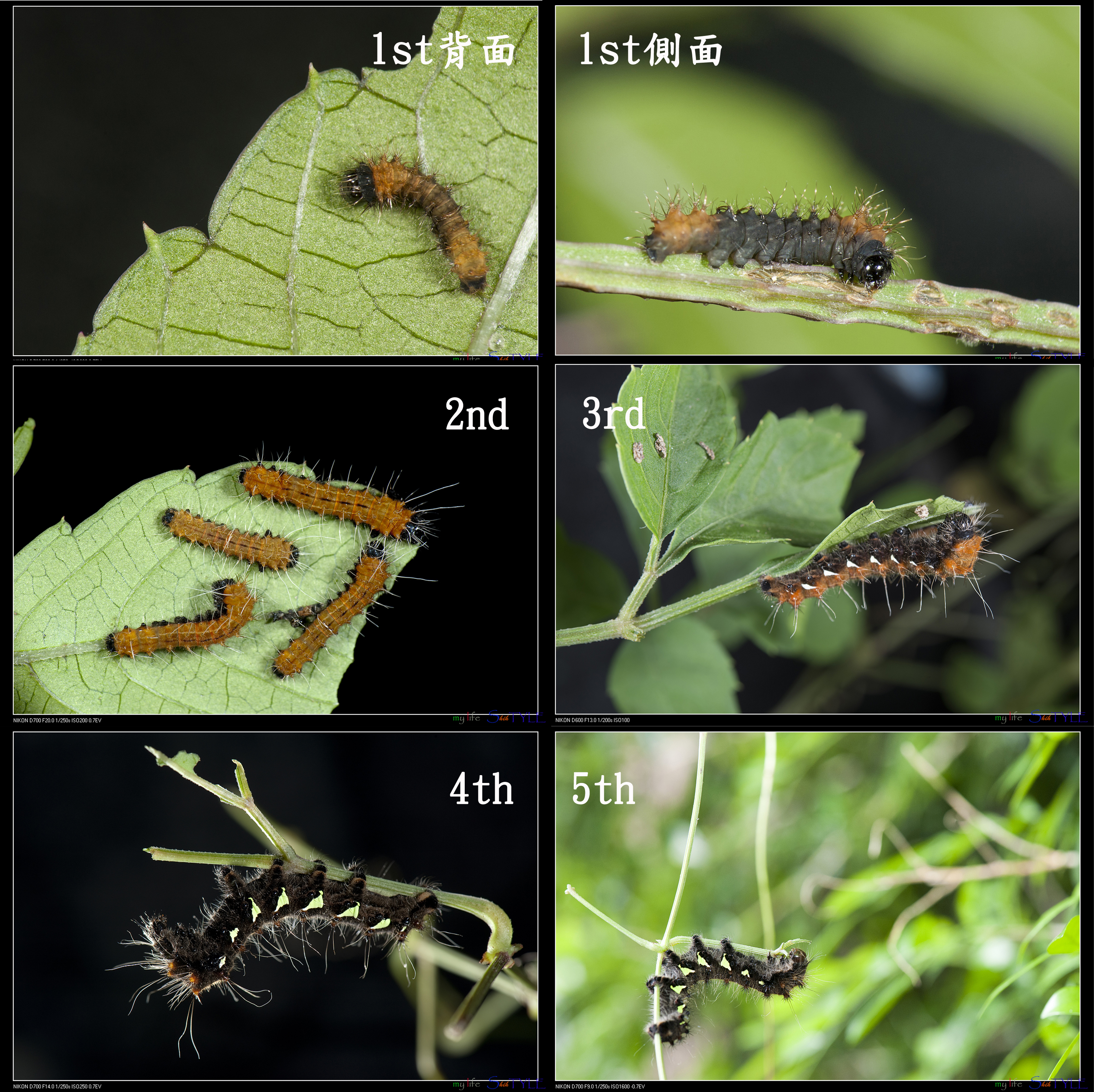 Loepa formosensis